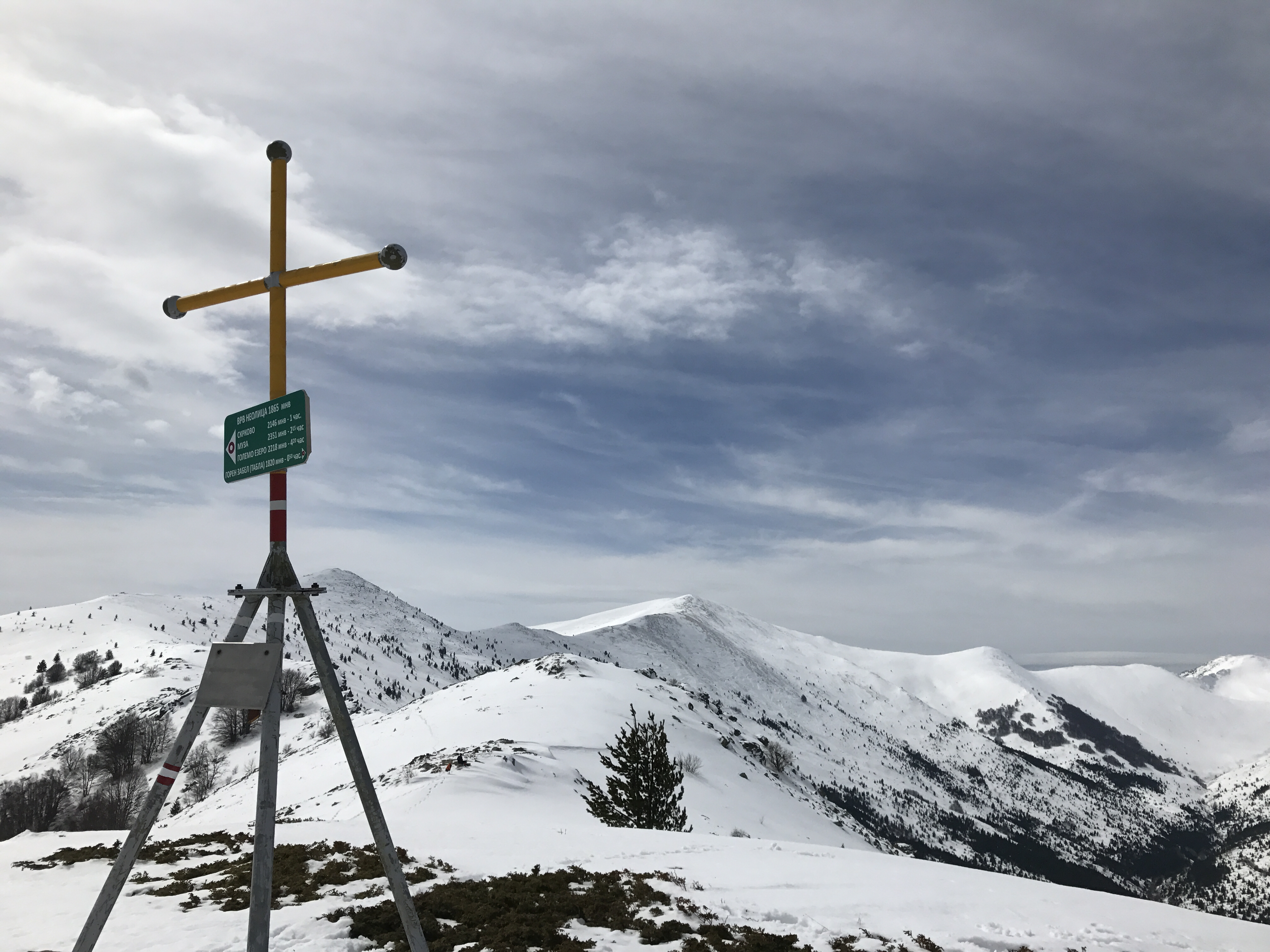 Врв Неолица